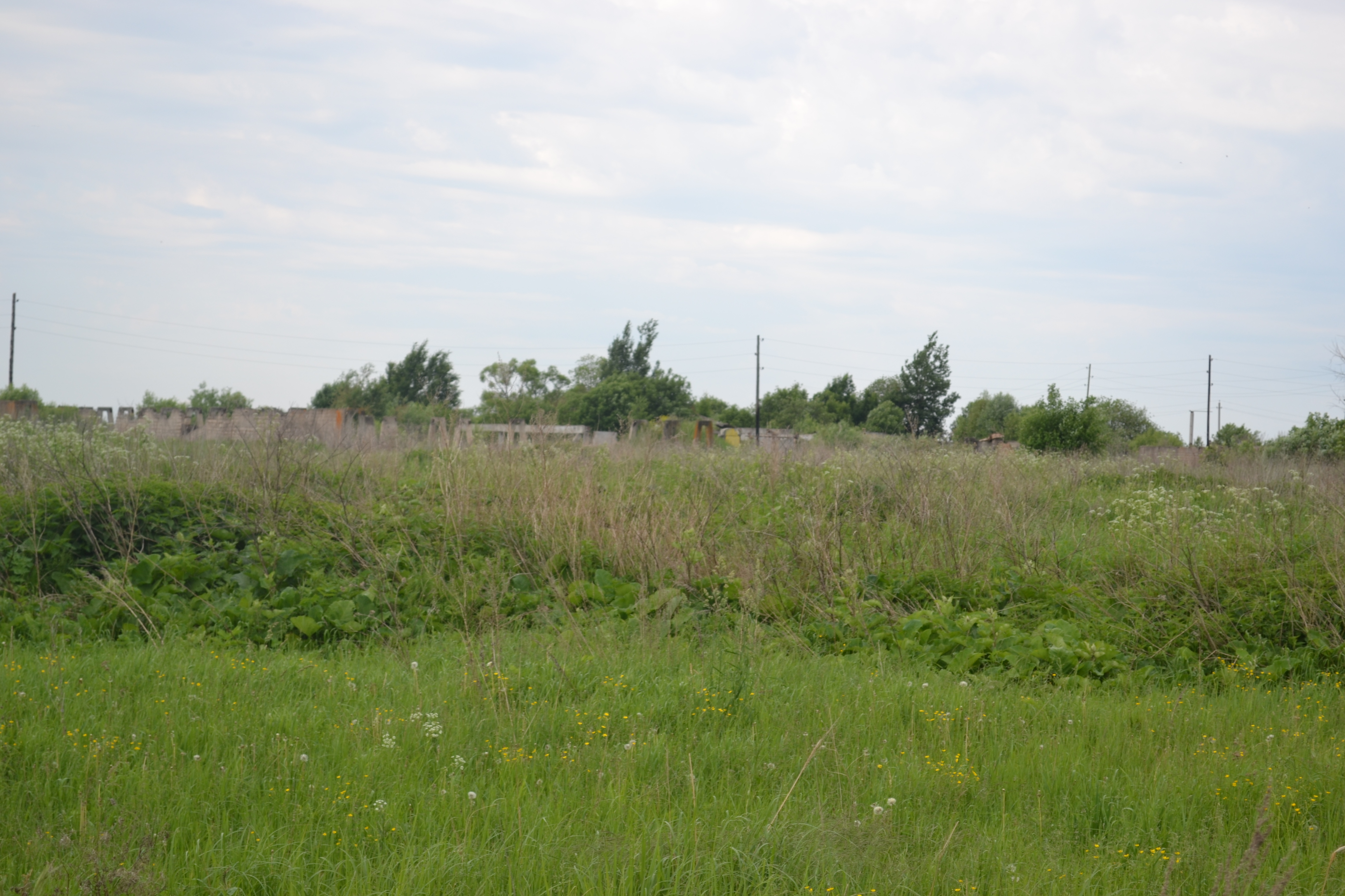 Заброшенная ферма в деревне Чисома (Шатурский район)